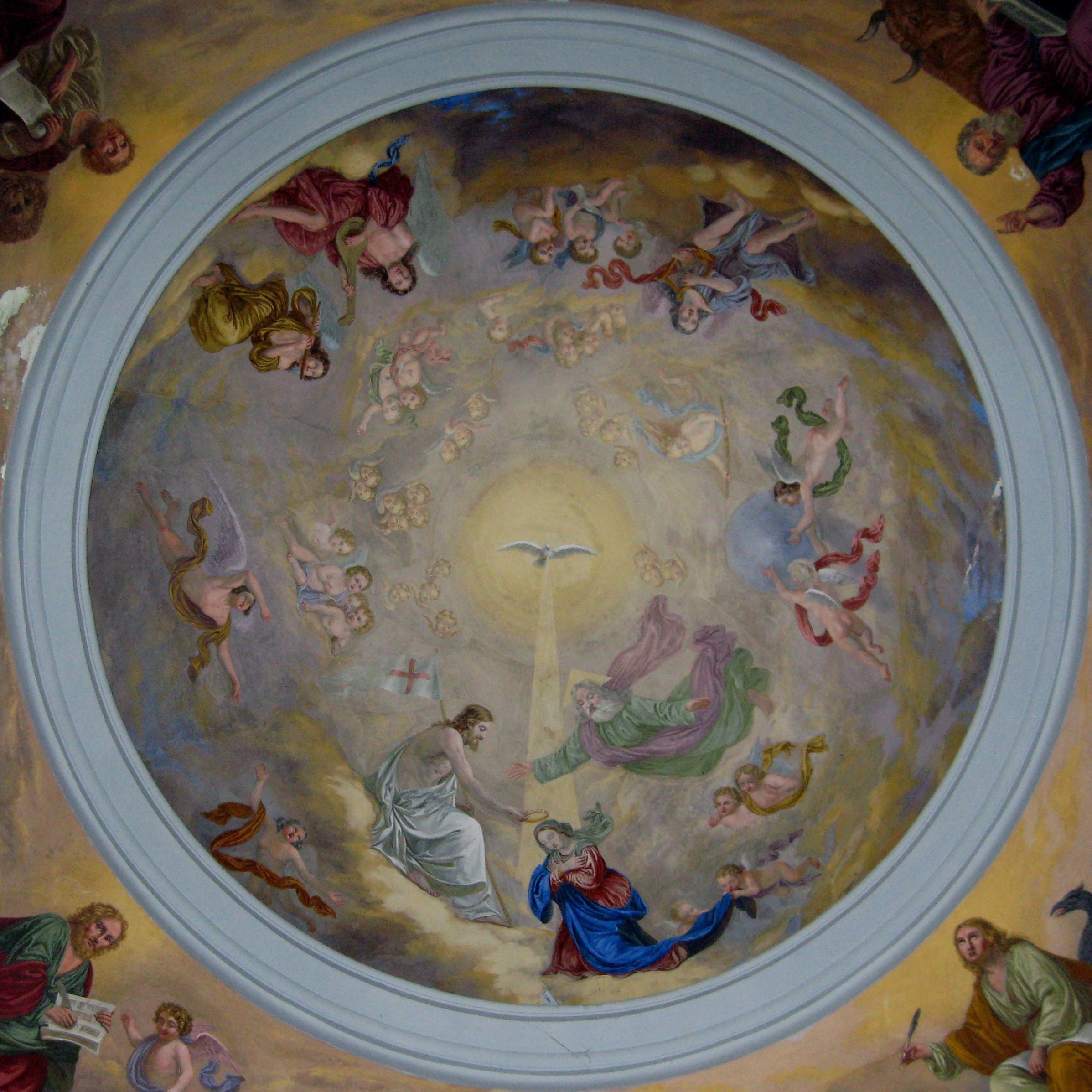 Deckenfresko von Francesc Parietti in der Ermita de Betlem, Artà, Mallorca, Spain